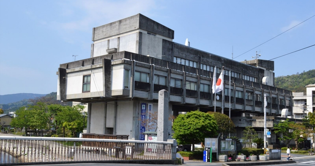 京都府宮津市の宮津市役所。丹下健三の門下生であり峰山町出身の沖種郎の設計により1962年竣工（『宮津市50年のあゆみ』宮津市、2004年、p.14）。